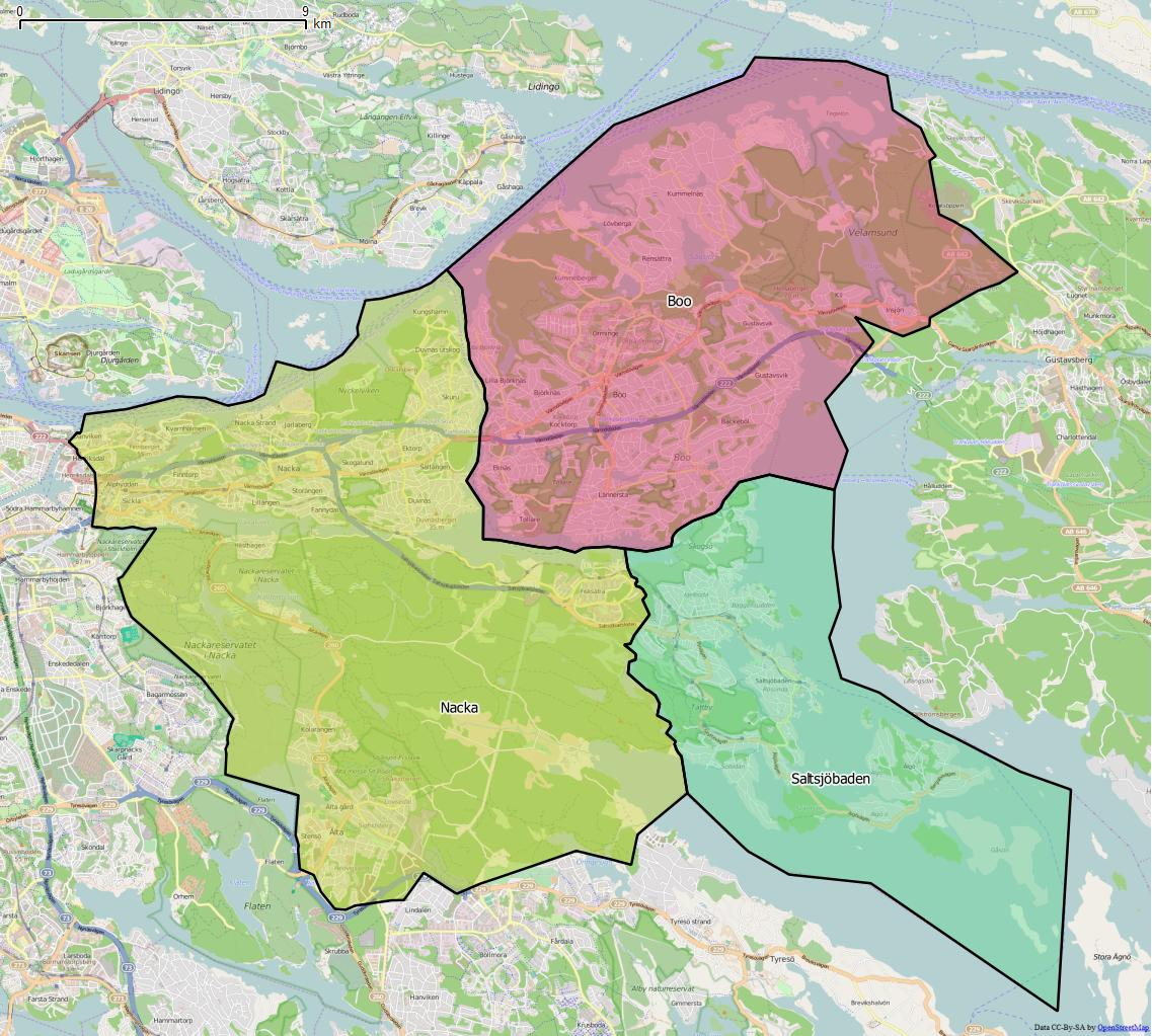 Distriktsindelningen i Nacka kommun World file: 31.88961065651799842 0 0 -31.88961065651799842 2013338.16560643818229437 8262412.62604718934744596